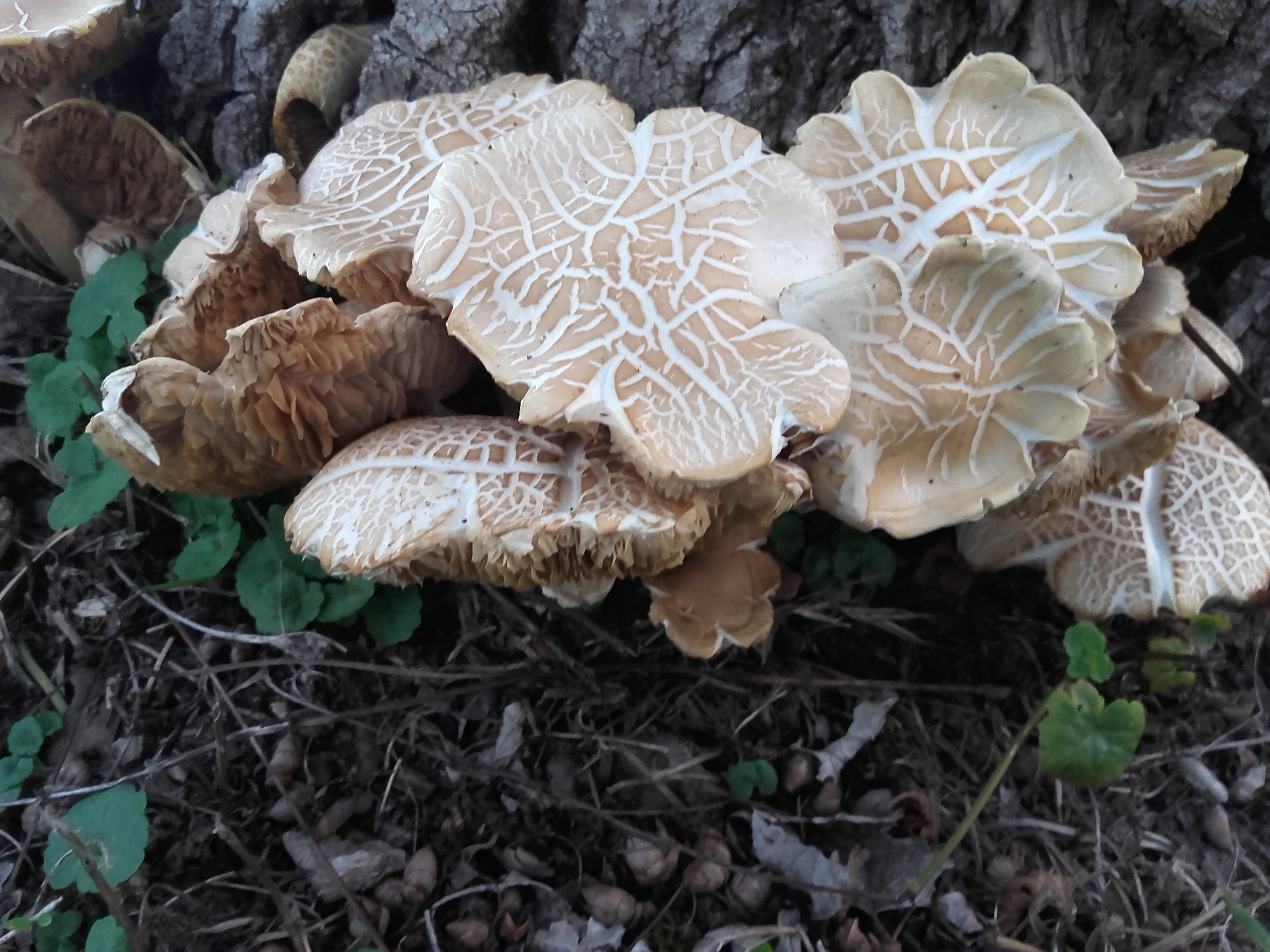 Јаблановача - групни раст